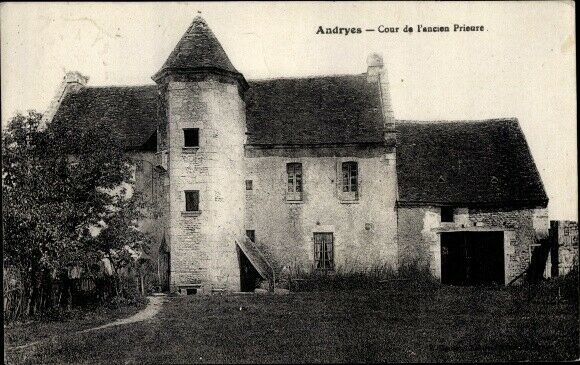 Vestiges de l'ancien prieuré d'Andryes en 1910. Transformés en ferme..